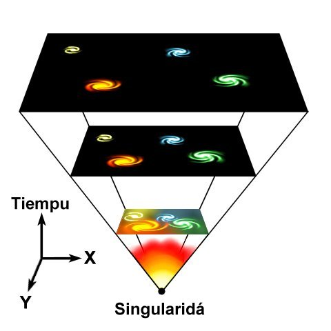 Espardimientu del universu